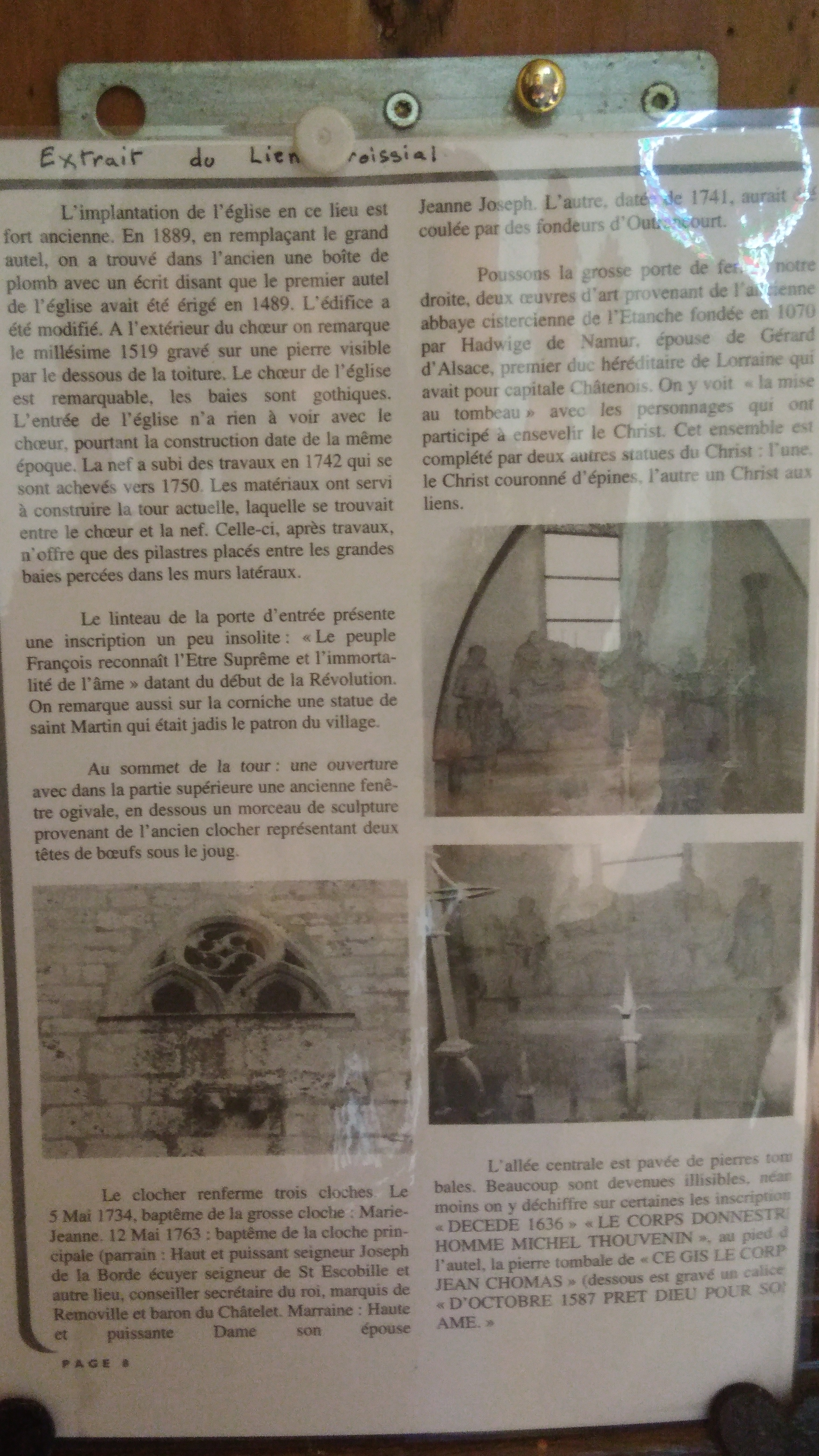 Photo d'une feuille intitulée "Extrait de Lien Paroissial" et affichée à l'intérieur de l'église de Rouvres-la-Chétive (88170) Date de prise de vue le 14/10/2017